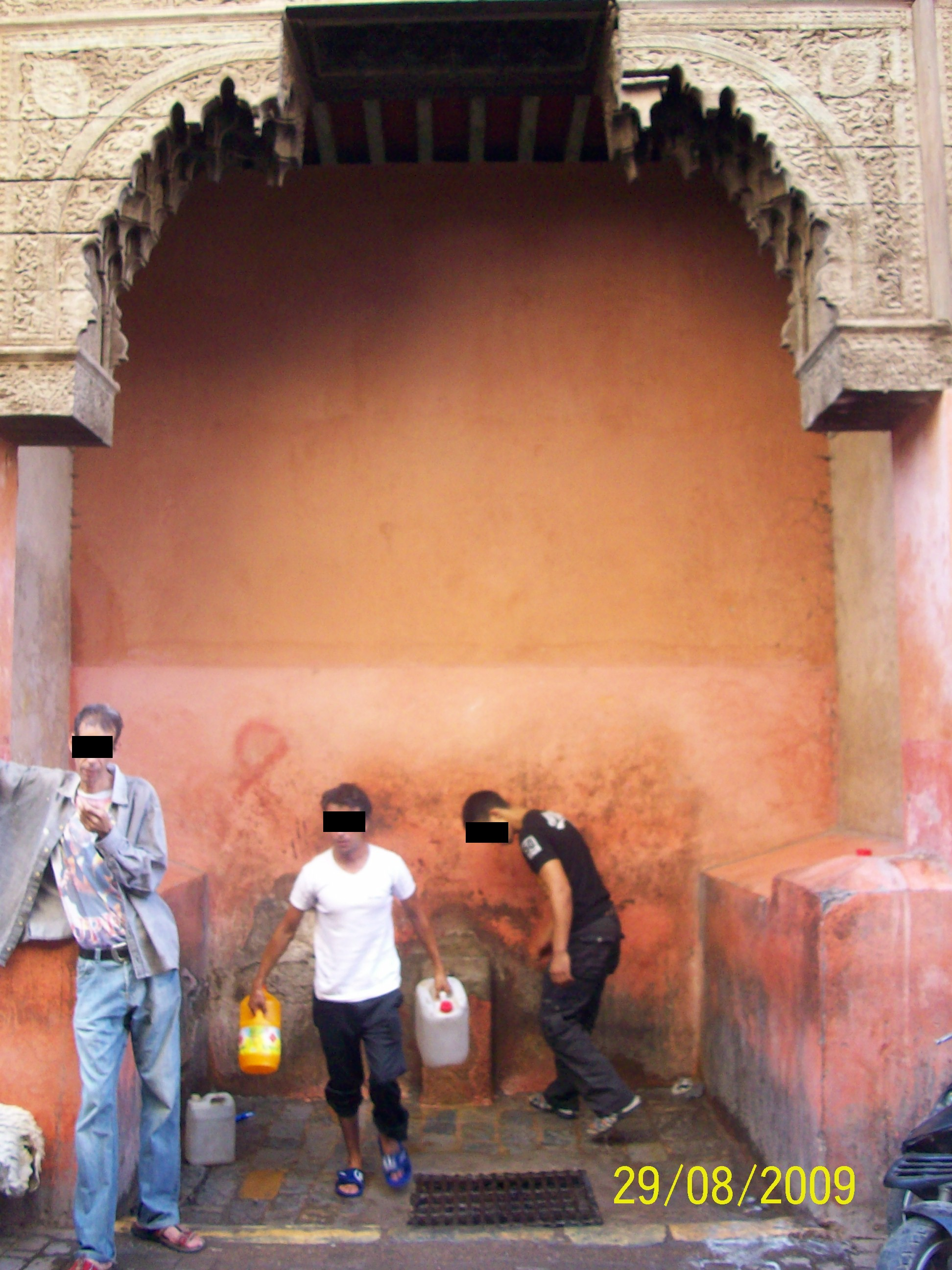 Photo de la Fontaine chrob ou chouf datant du 17ème siècle.